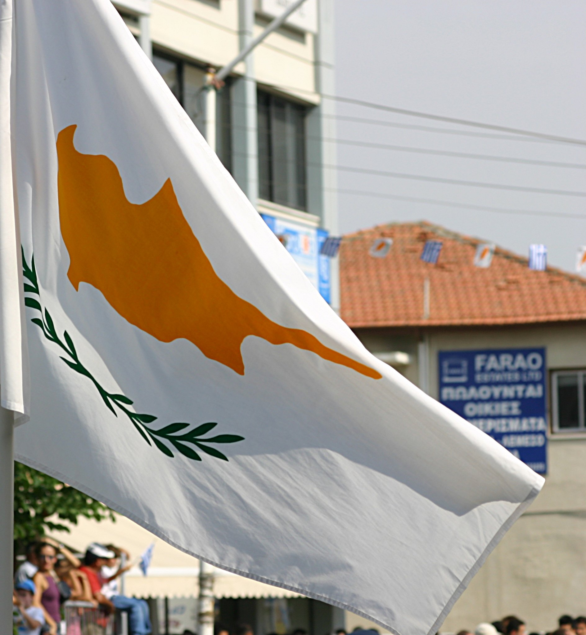 Cyprus flag